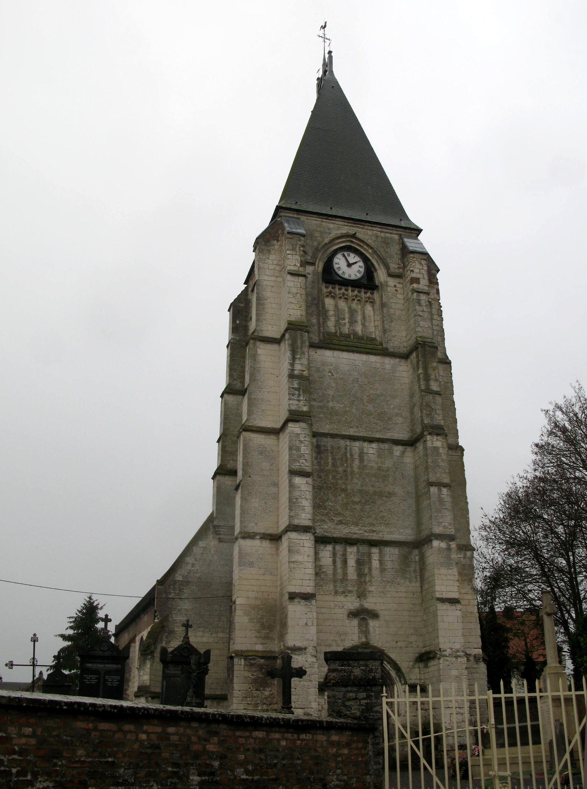 Warlus (Somme, France) - L'église, vue alors que la petite pluie d'automne semble juste s'arrêter.